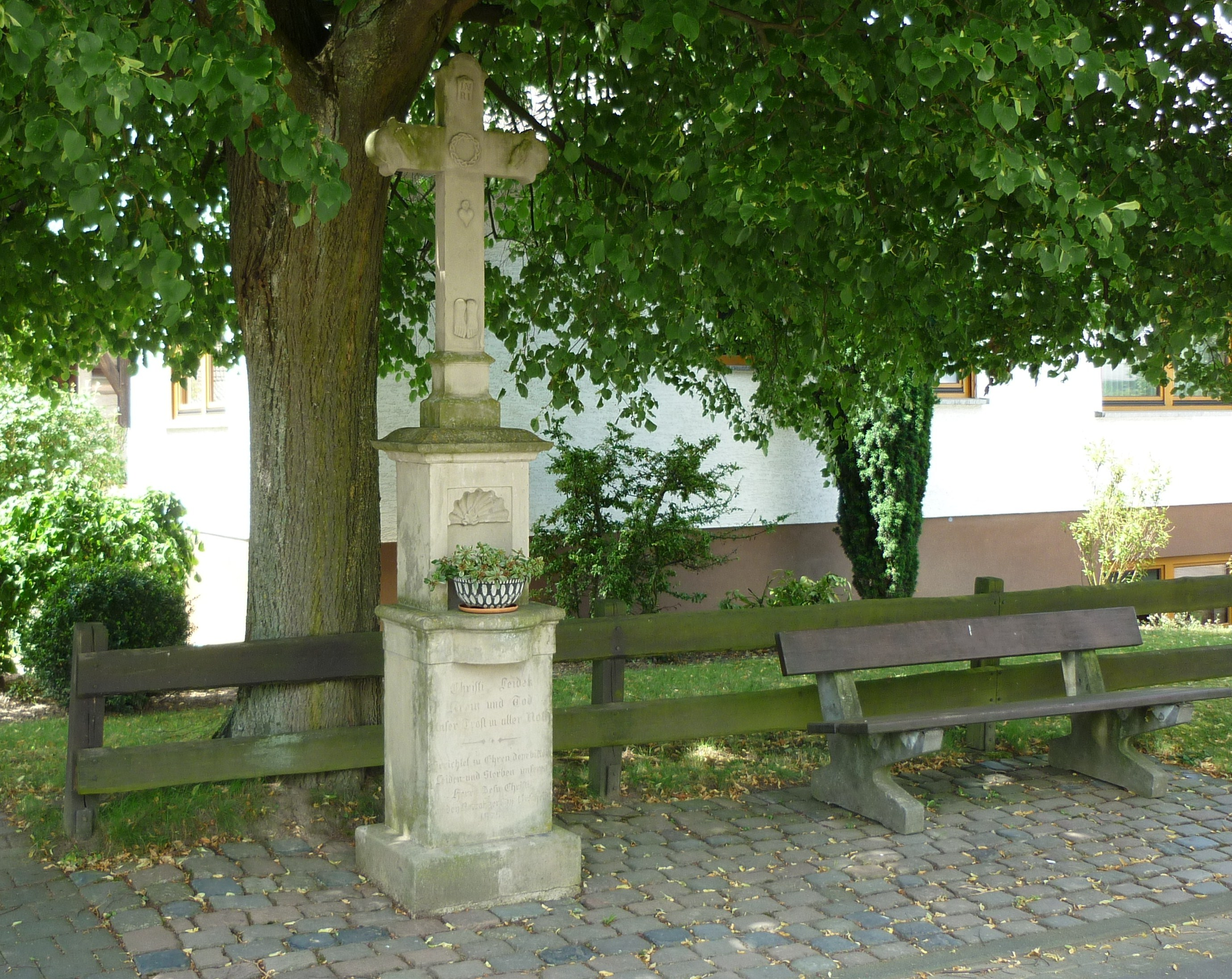 Votivkreuz, Orscheider Straße 27a, Orscheid, Aegidienberg